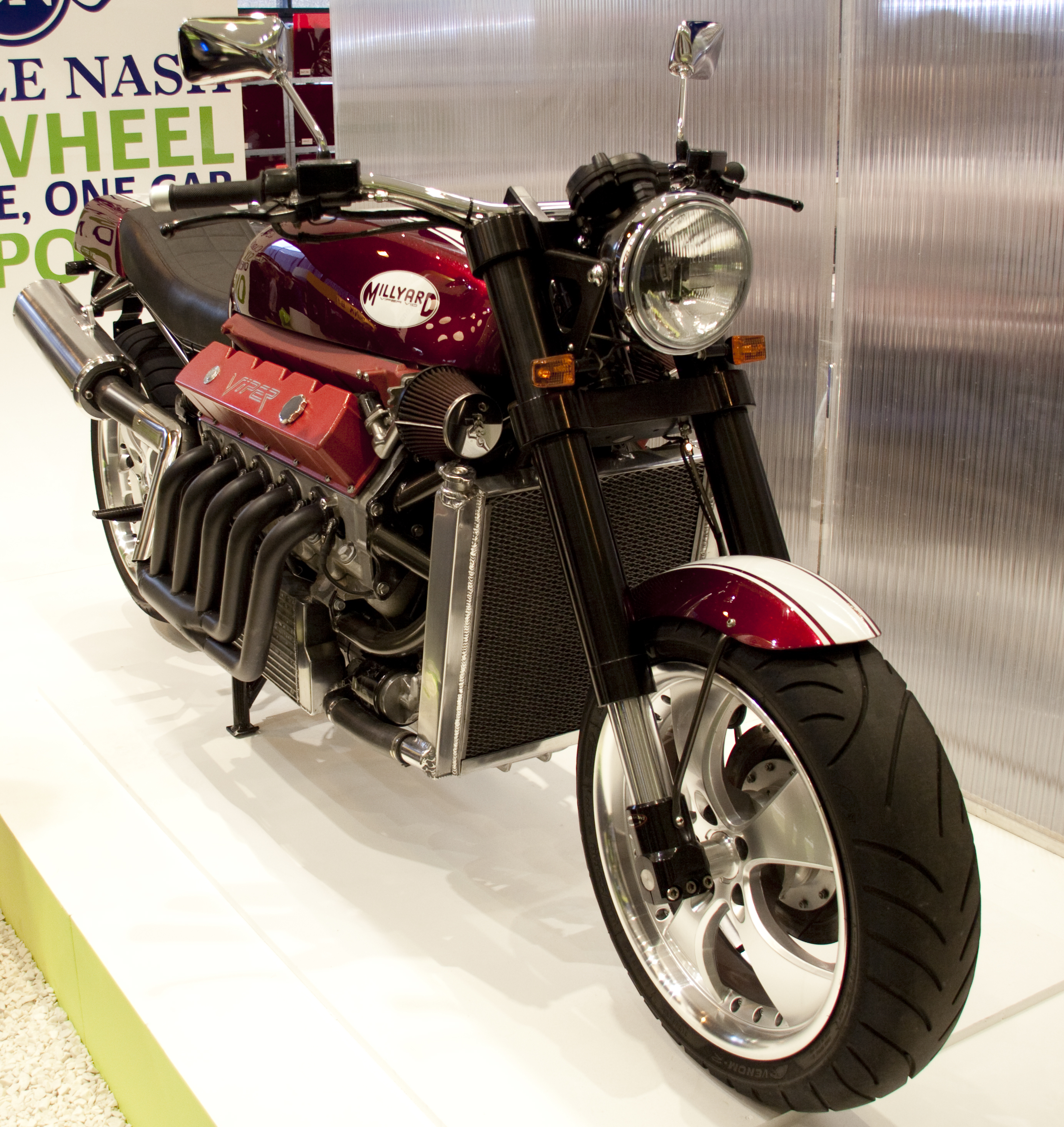 An engine too far!